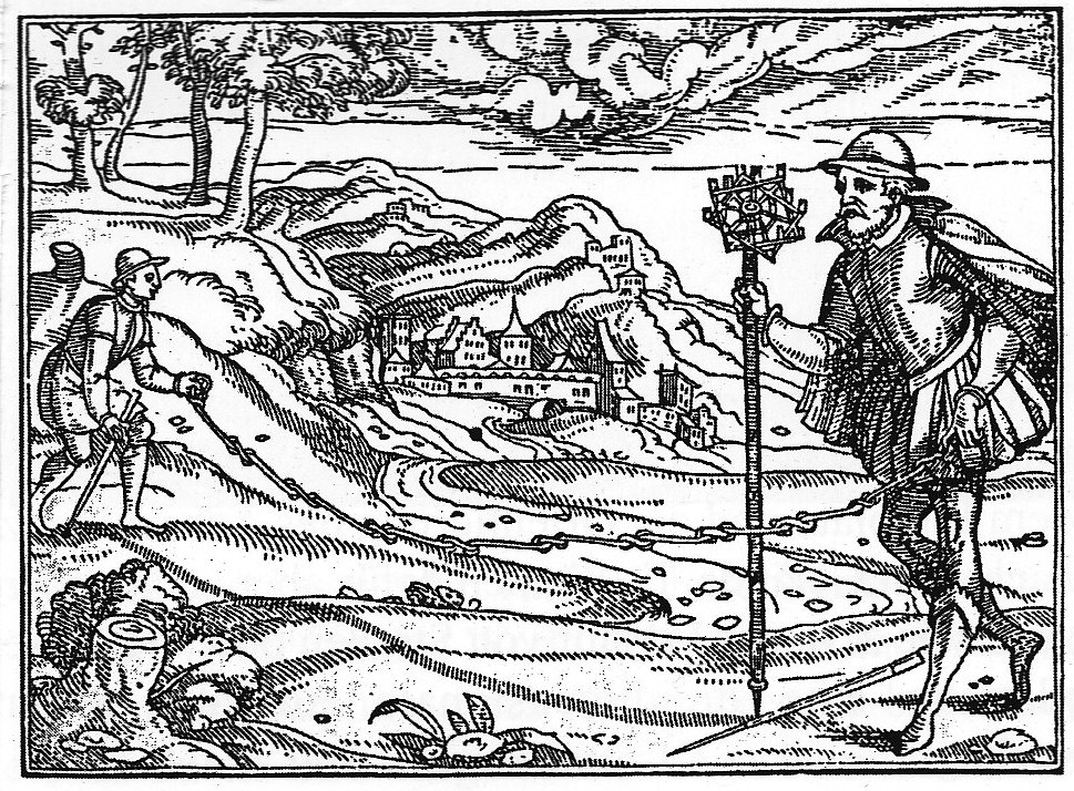 Messkette und Winkelkreuz. Nach Carolus Stephanus und Johannes Liebhaltus, Sieben Bücher von dem Feldbau, Straßburg 1579, Erwin Reidinger: Mittelalterliche Stadtplanung am Beispiel Linz. Historisches Jahrbuch der Stadt Linz 2001, Seite 23